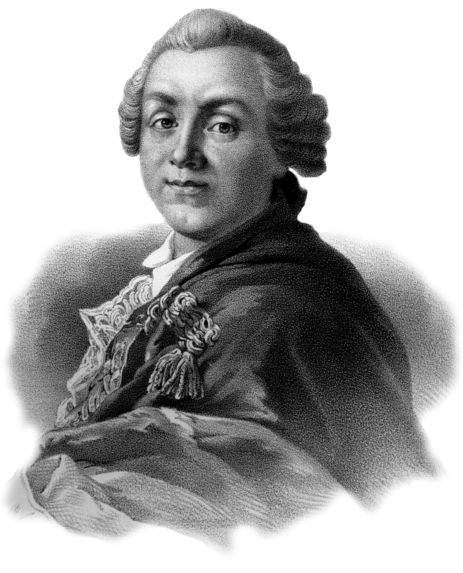 A. SOUMAROKOW. Съ гравюры N.N. Лит. А. Мюнстера, СПБ. Imp. Lith. A. Munster (Editeur)